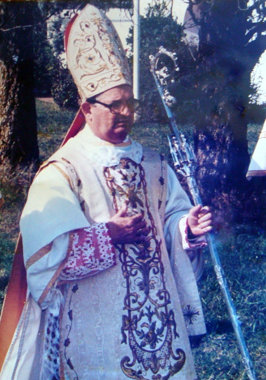 O Bispo Dom Licínio Rangel, nos anos 90, usando os paramentos para celebrar uma Missa Pontifical, Dom Licínio Rangel está revestido de casula e mitra pertencentes a Dom Antônio de Castro Mayer e portando báculo de Dom Marcel Lefebvre, por ocasião de sua sagração episcopal. Prelado da União Sacerdotal São João Maria Vianney, em Campos, RJ.